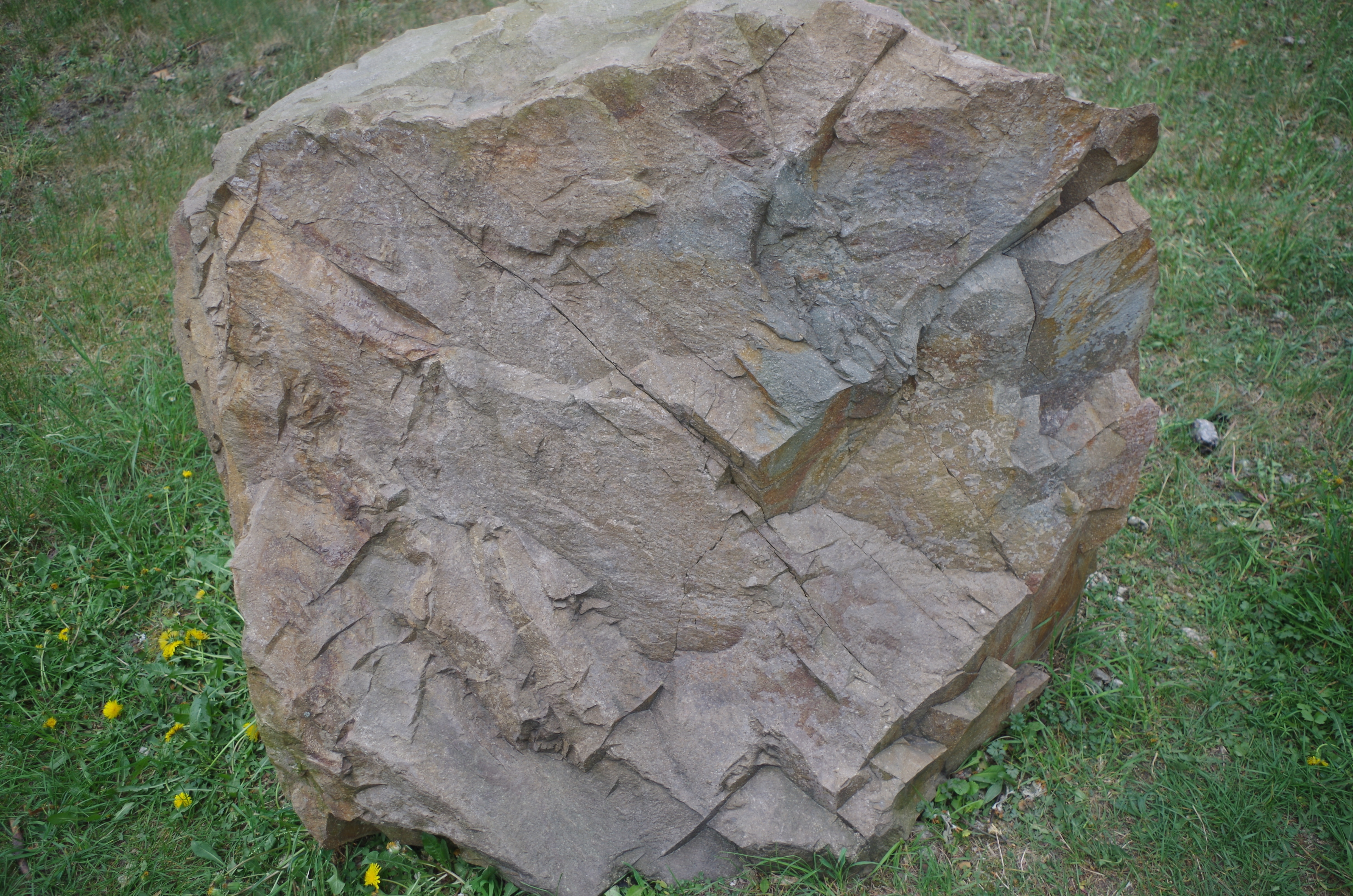 Ryodacyt z kamieniołomu Zalas koło Krzeszowic (Polska). Okaz jako eksponat dydaktyczny przy Centrum Dziedzictwa Kulturowego Jury w Podlesicach